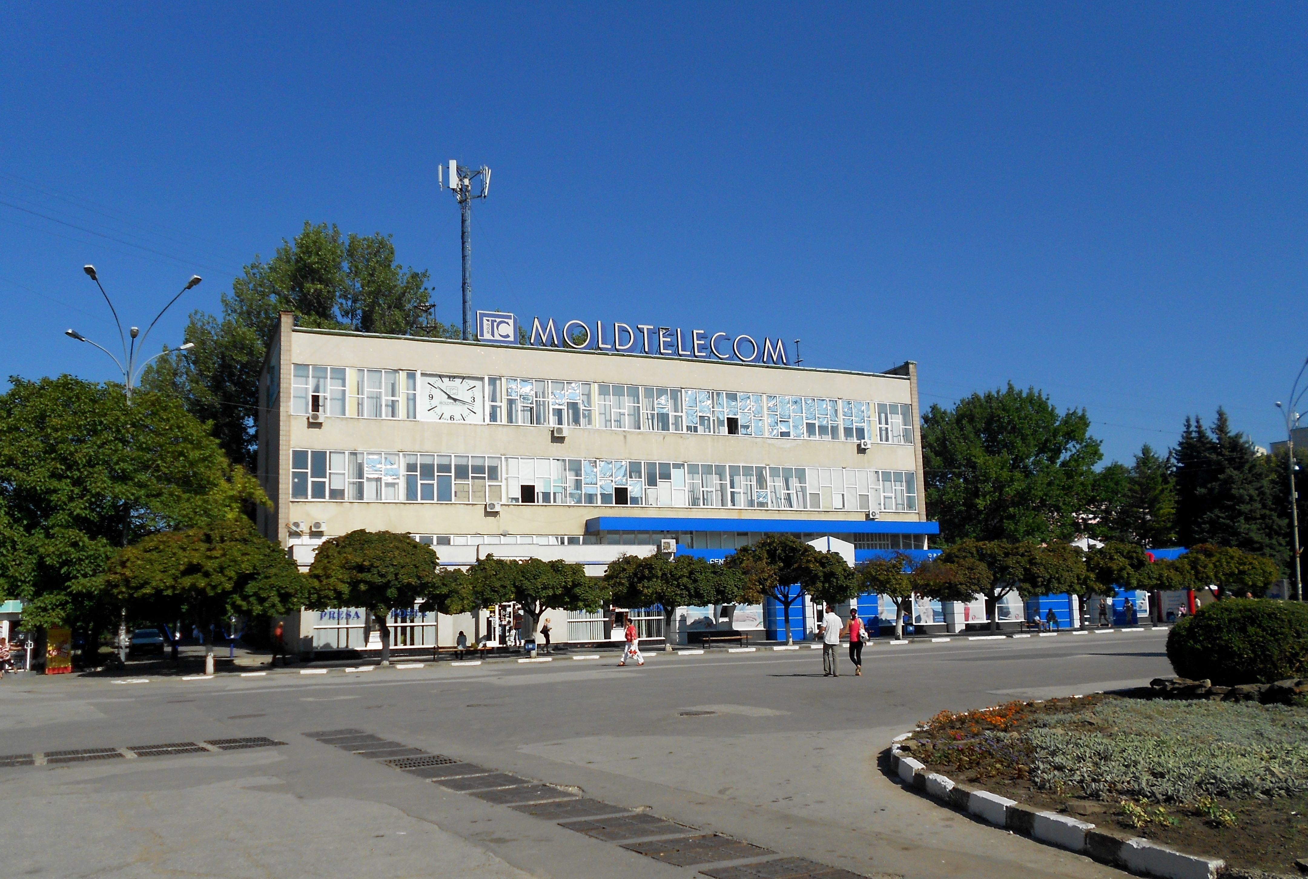 Fialiala Moldtelecom în Bălți.